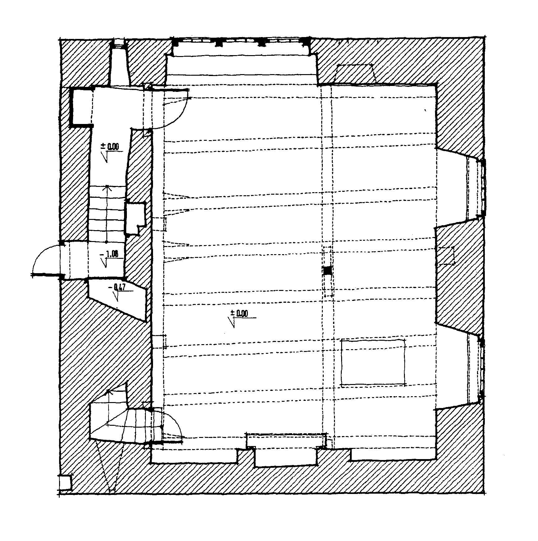 Romanisches Steinwerk osnabrueck grundriss